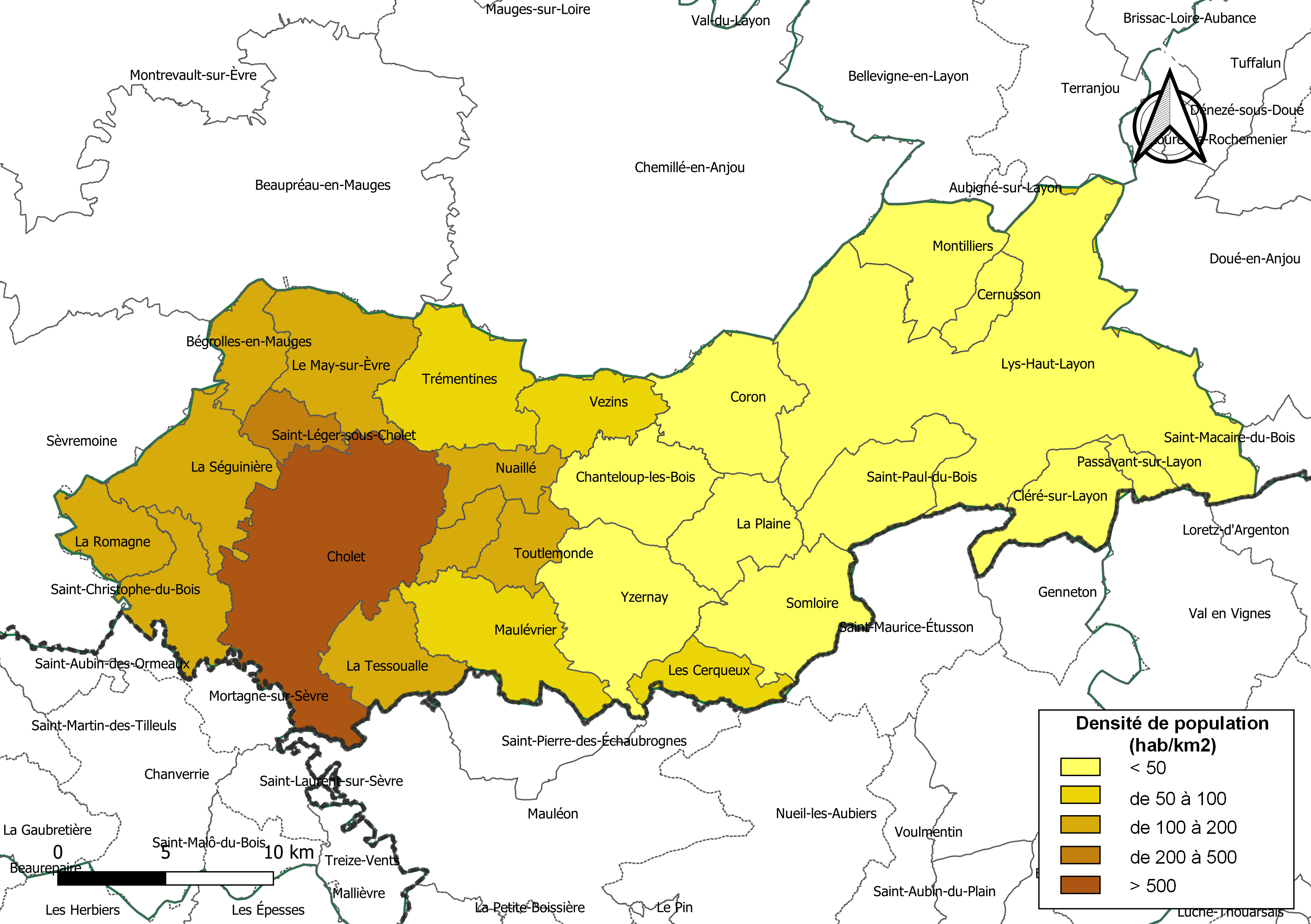 Carte des densités de population (millésimée 2016) des communes de l'intercommunalité Agglomération du Choletais, département de Maine-et-Loire, France. Composition au 1er janvier 2019.